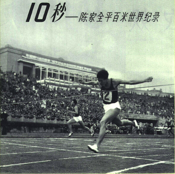 1966年陈家全